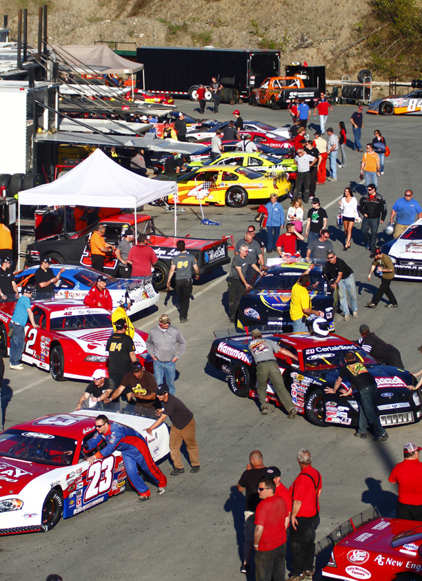 Paddock - Autodrome Chaudière - 18 mai 2013 - Photo Paul-Émile Poulin-Jacques